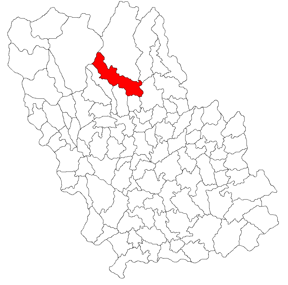 Categorie:Hărţi ale judeţului Prahova